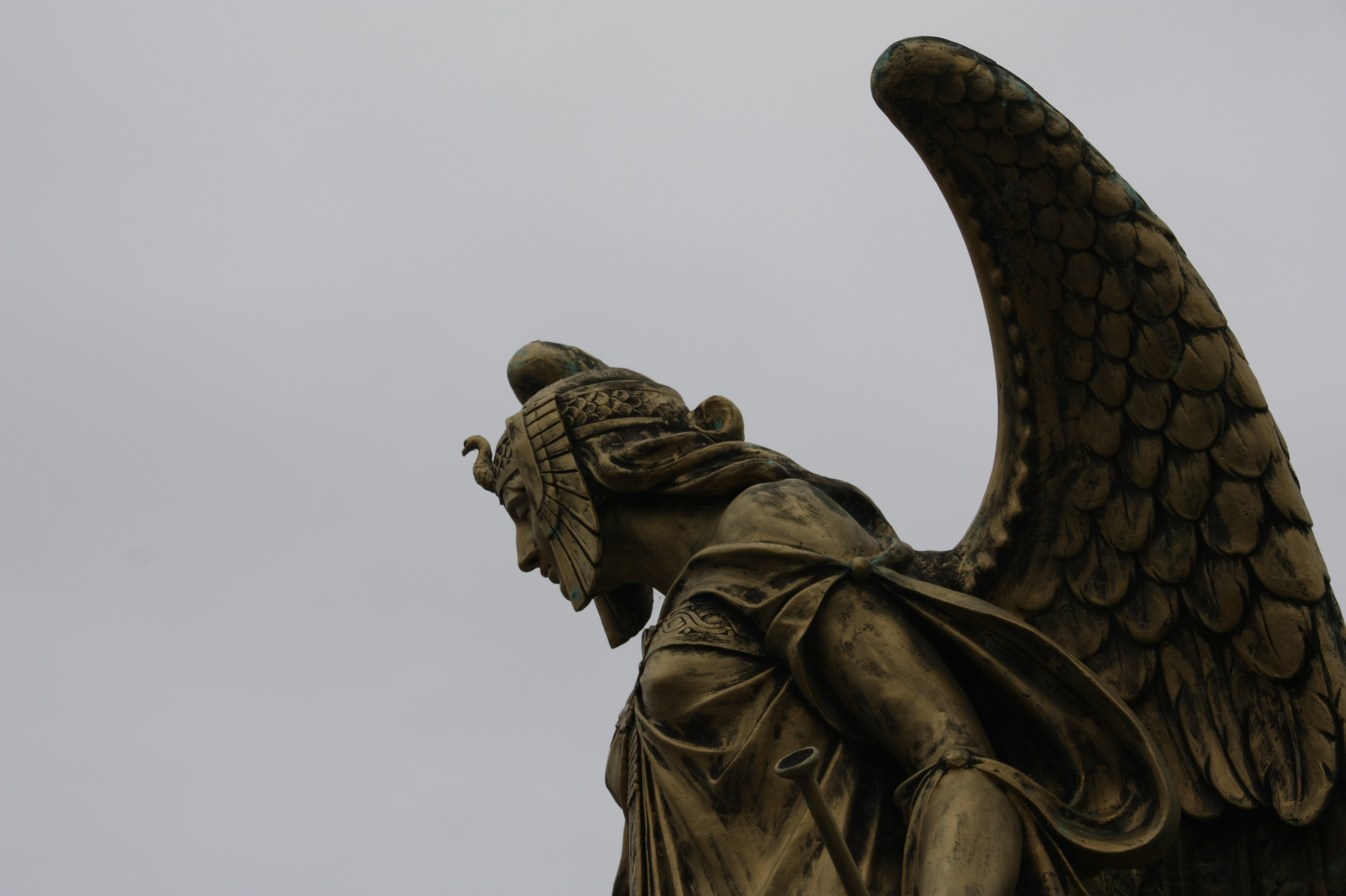 Cementerio Municipal de Ballena